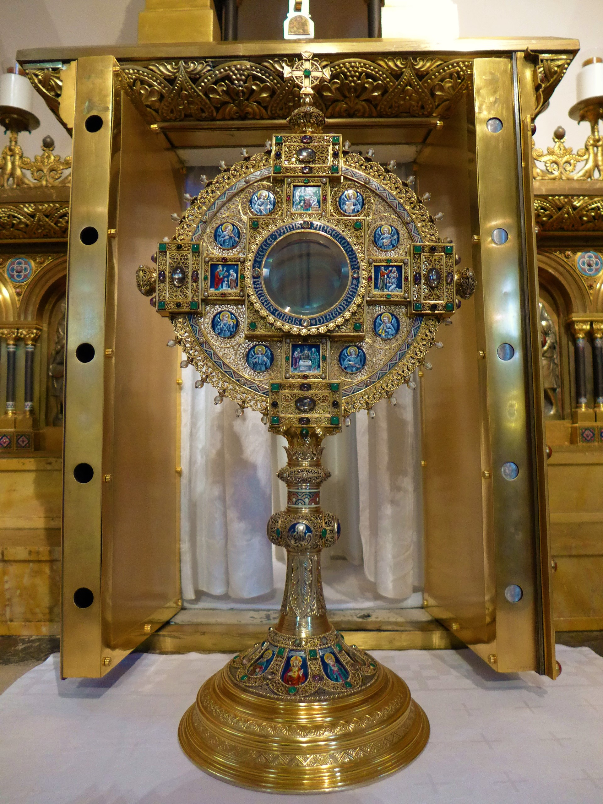 Saardom, Neoromanische Scheibenmonstranz vor dem geöffneten Tabernakel